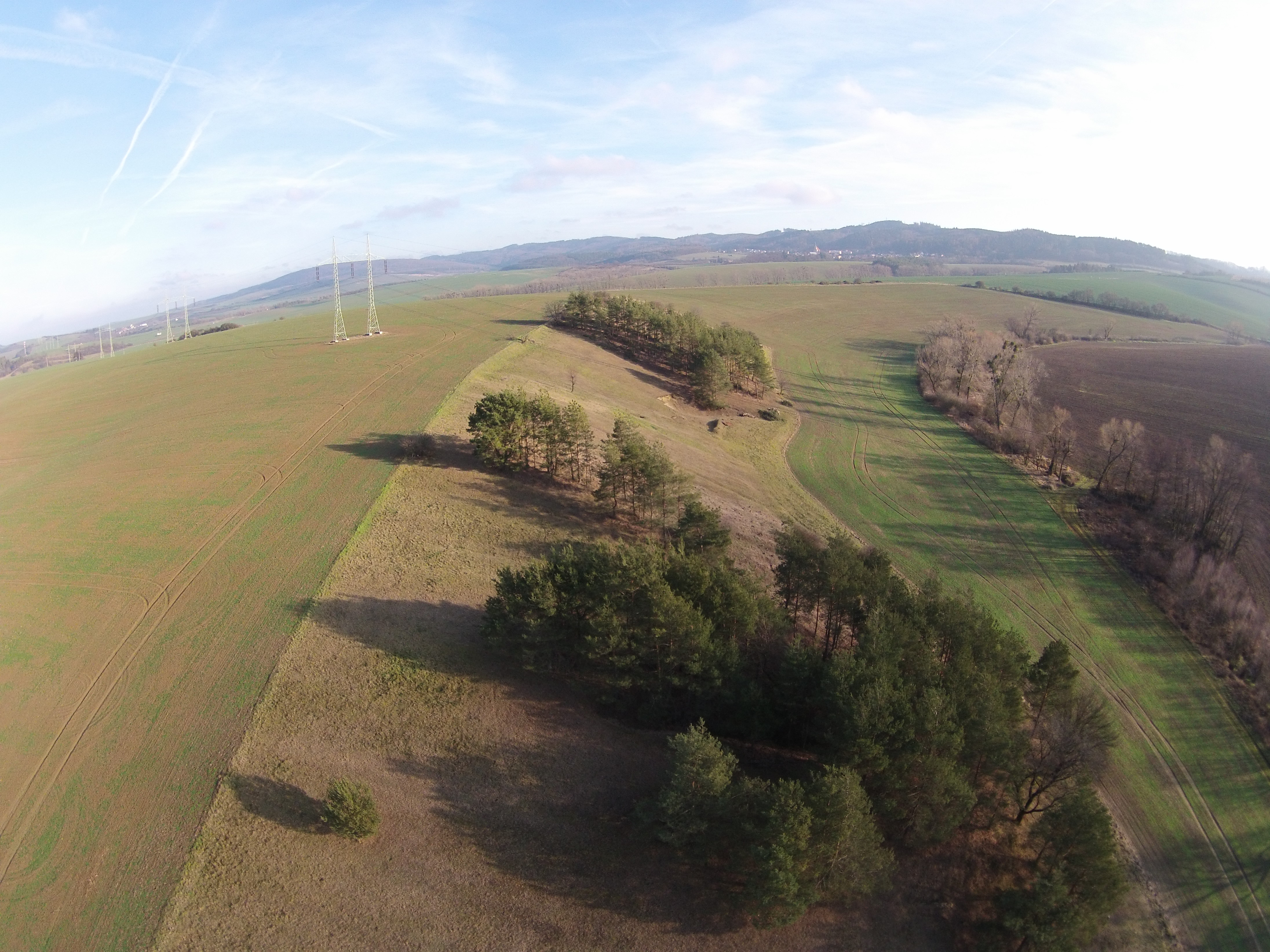 Přírodní rezervace Podsedky.